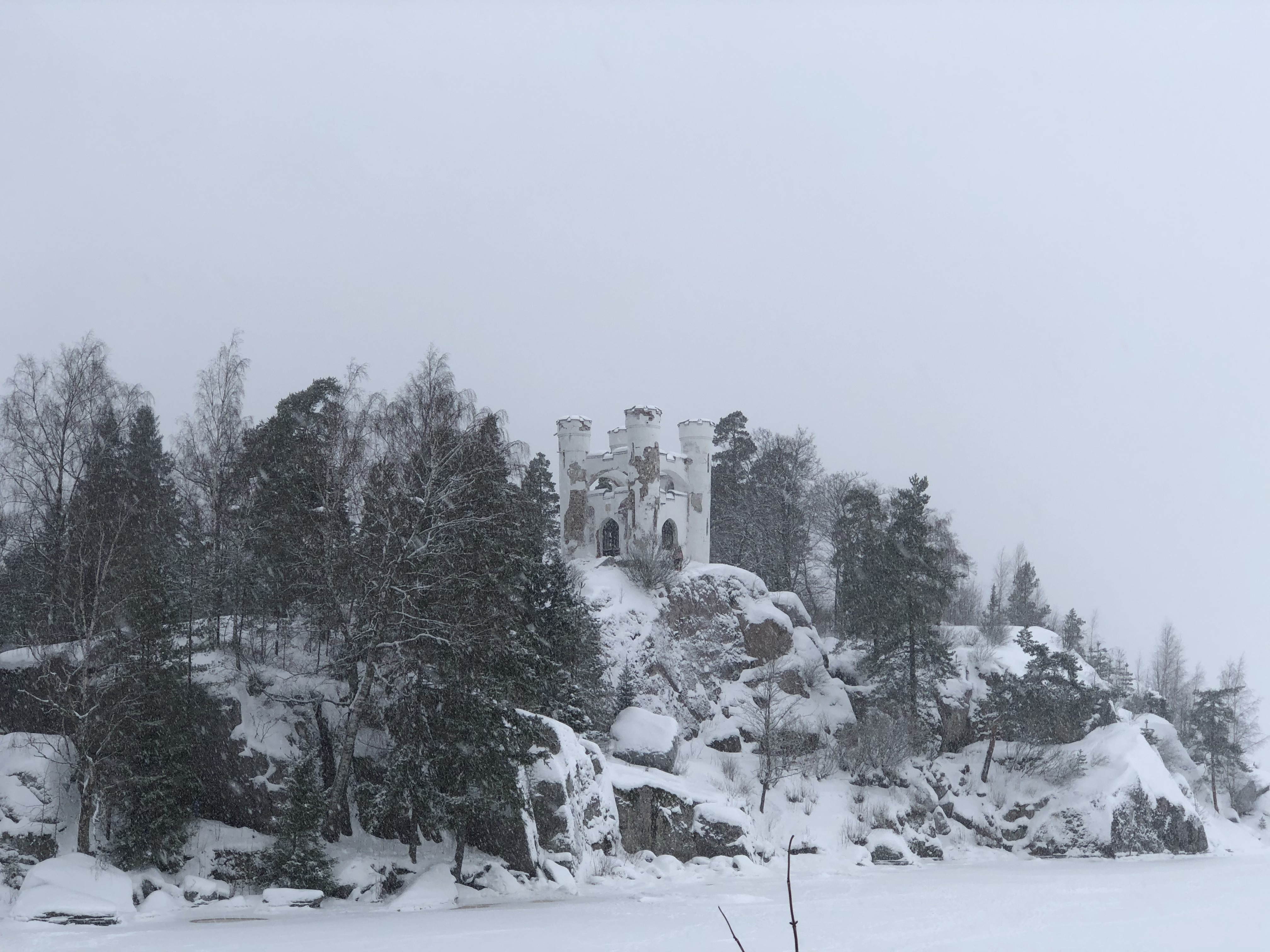 Парк Монрепо. Людвигштайн_2019